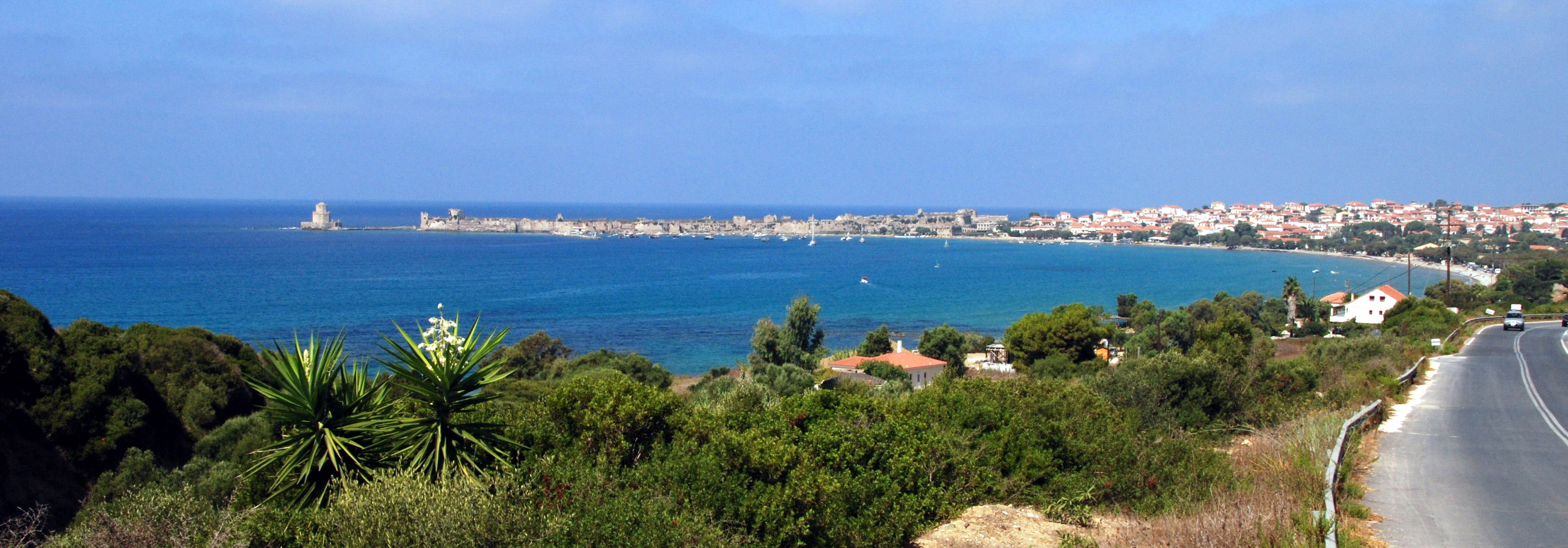 Methoni - Panorama